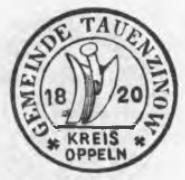 Altes Siegel des Ortes Tauenzinow im Kreis Oppeln, Schlesien.